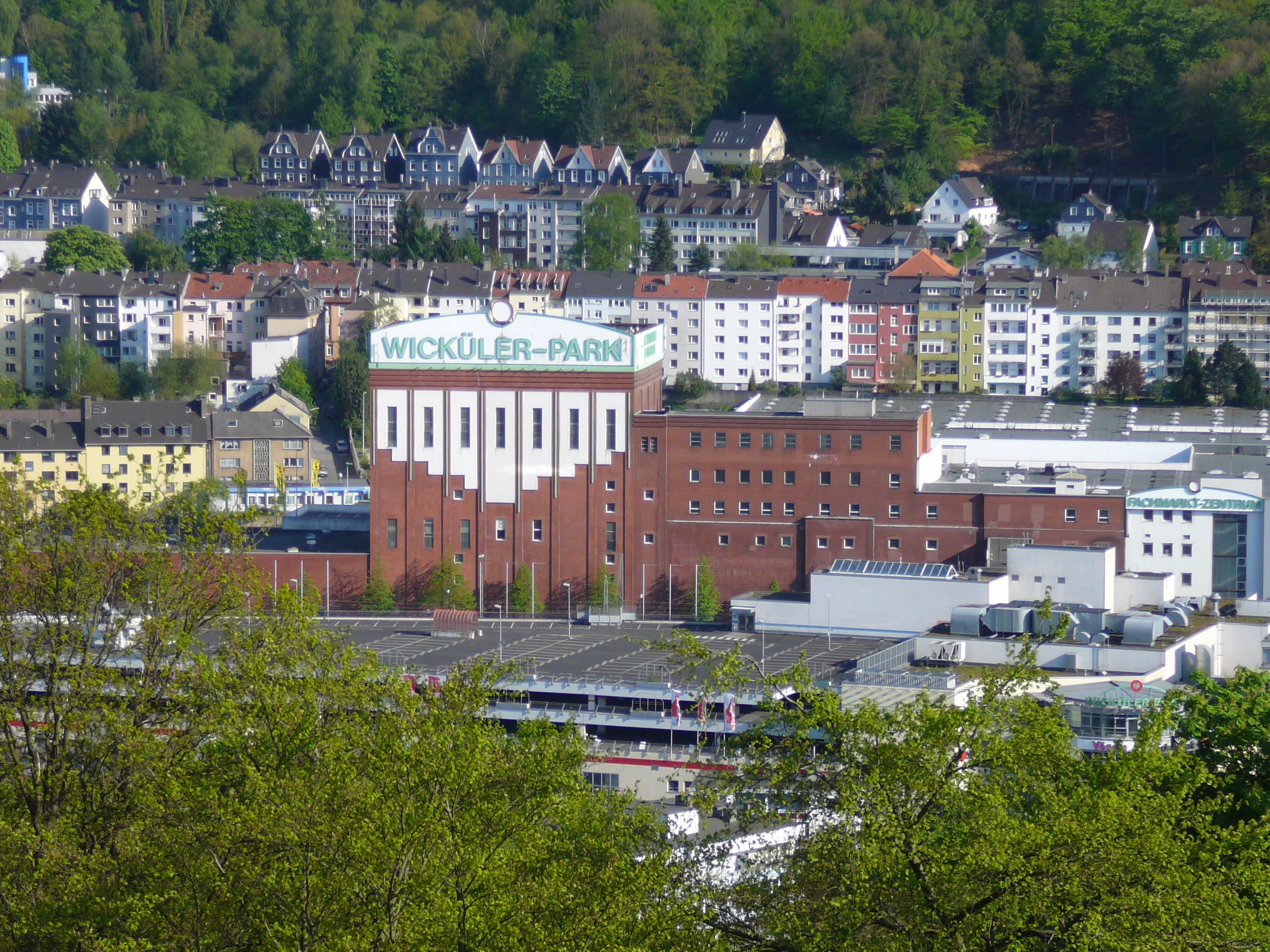 Hardt-Anlagen, Wuppertal